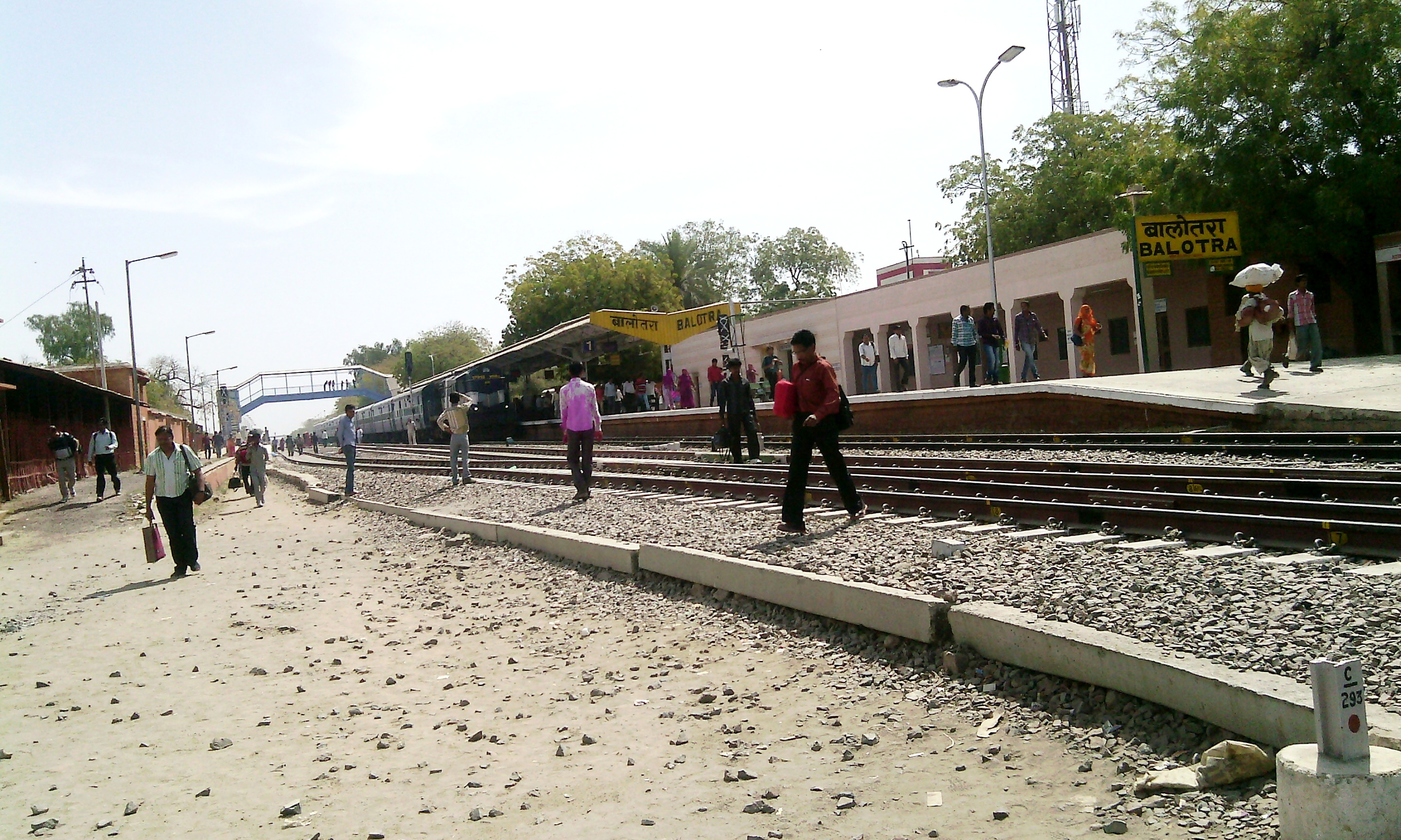 बालोतरा रेल्‍वे स्‍टेशन